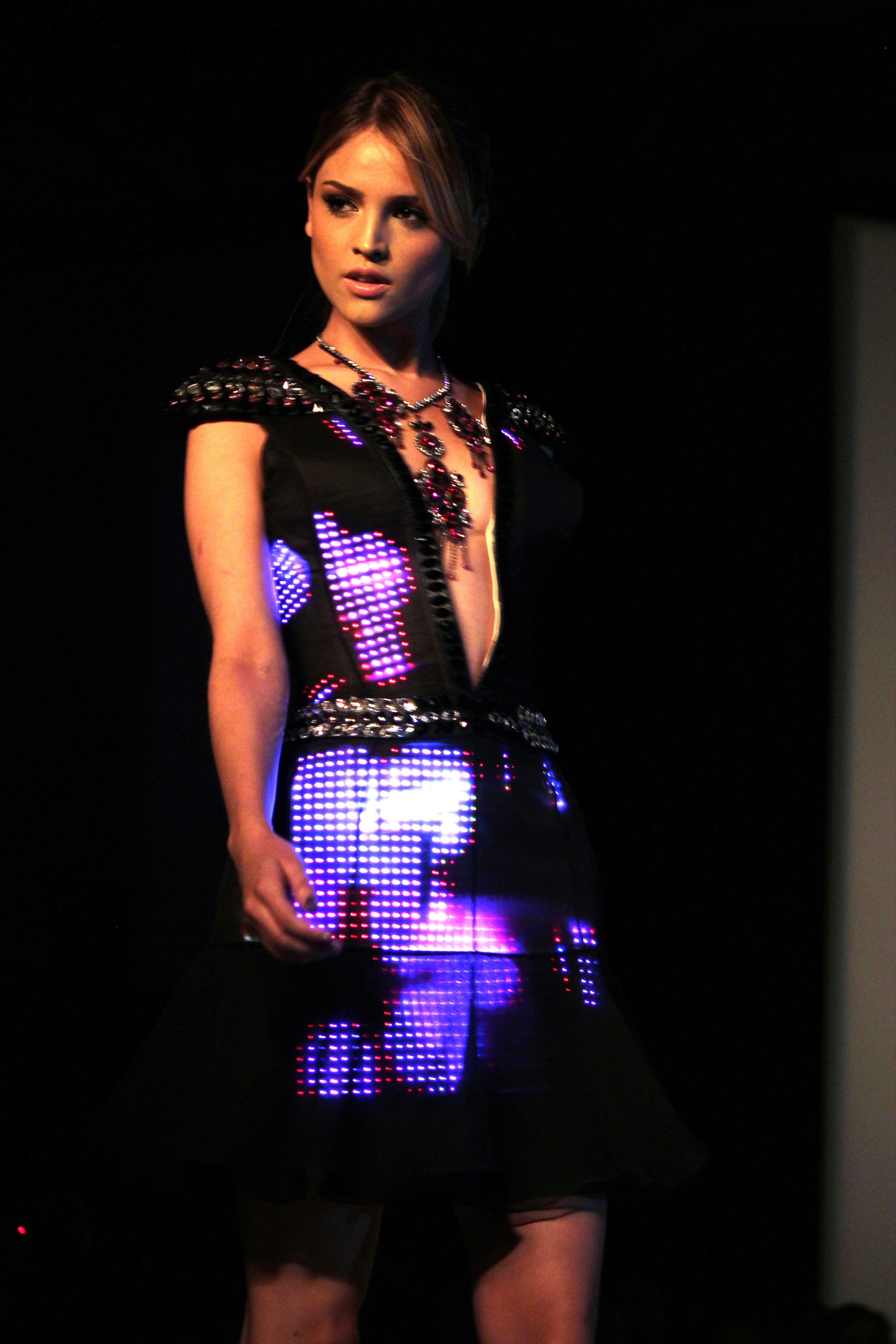 La cantante y actriz Eiza González durante el IDM pasarelas en CuteCircuit, 2013.